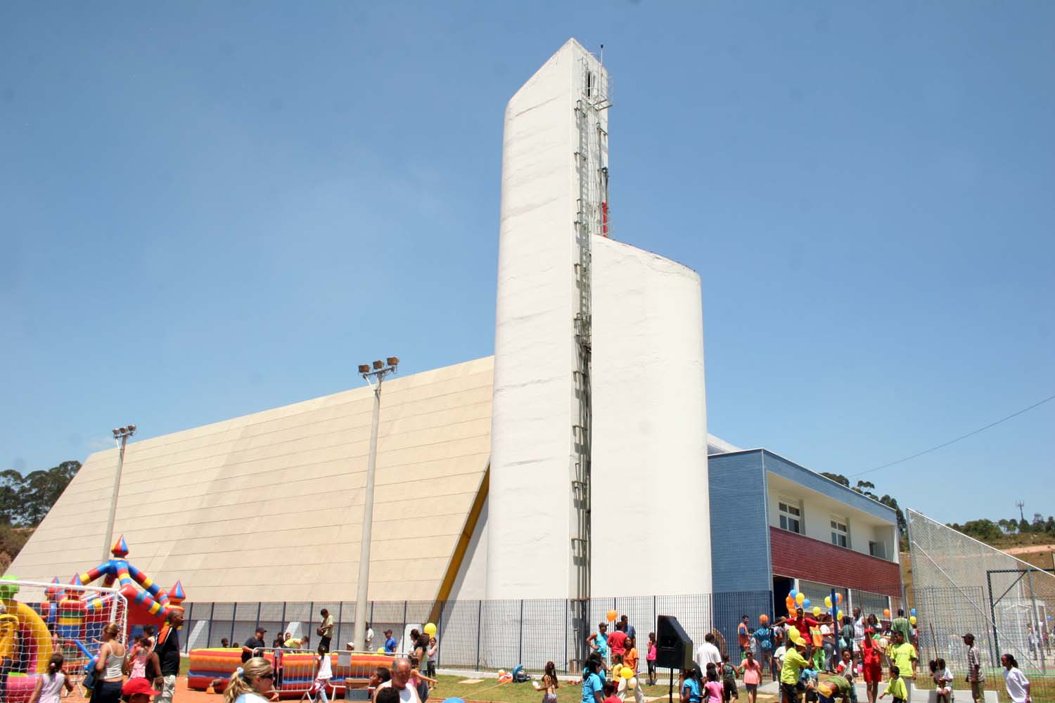 Imagem de SP